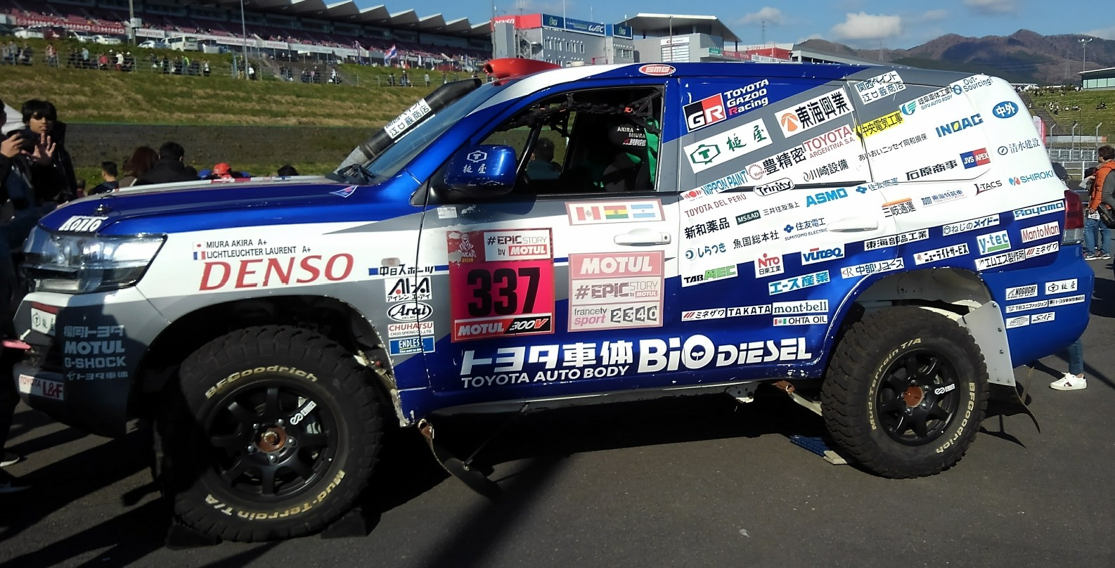 トヨタ車体チームランドクルーザーの2018年型マシン